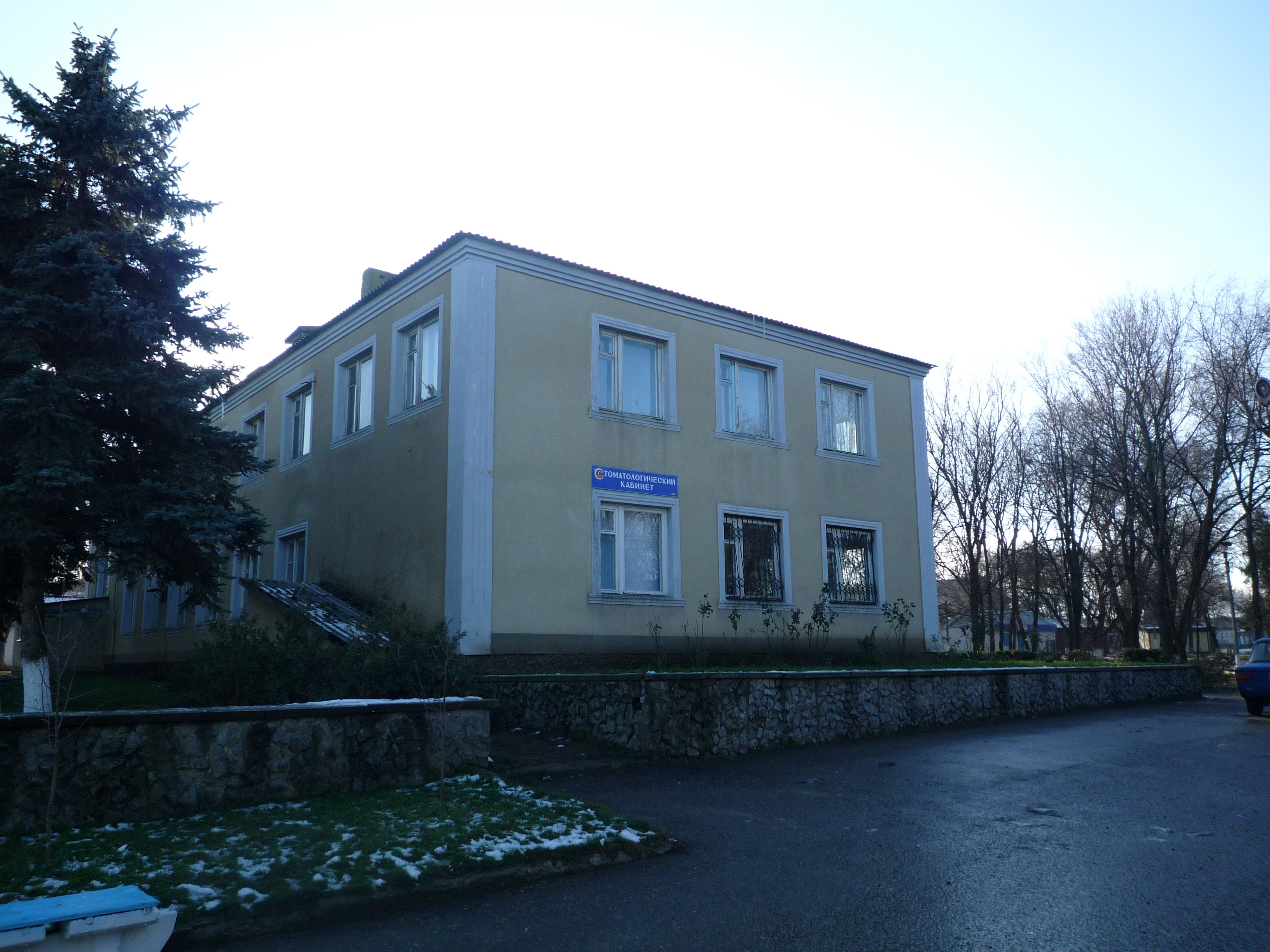 Здание Кугультинского сельского совета.